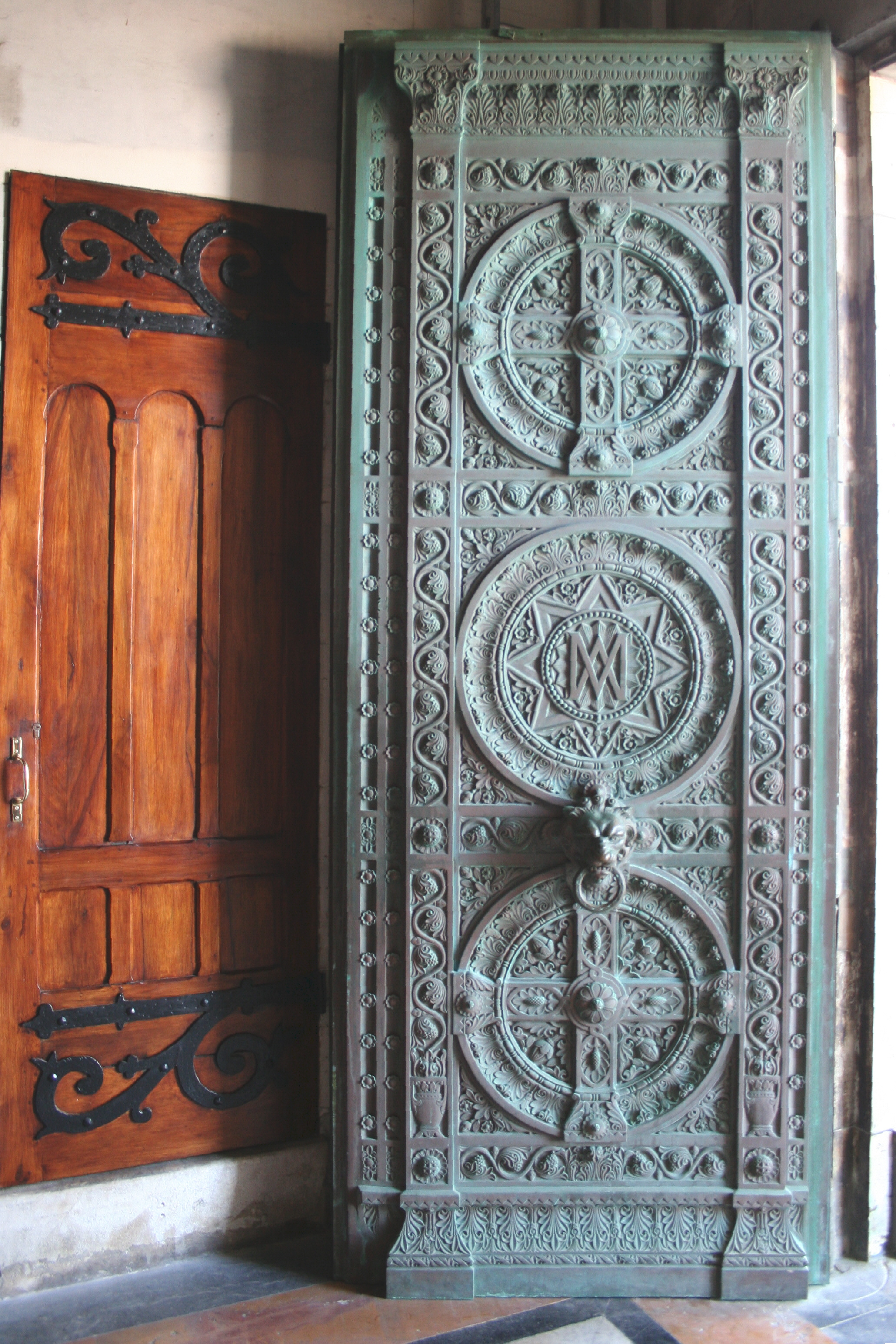 Porte de bronze de la basilique Notre-Dame de la Garde à Marseille